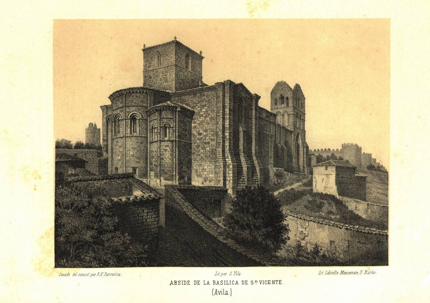 Grabado de Francisco Javier Parcerisa del ábside de la basílica de San Vicente, Ávila, España, publicado en el año 1865.